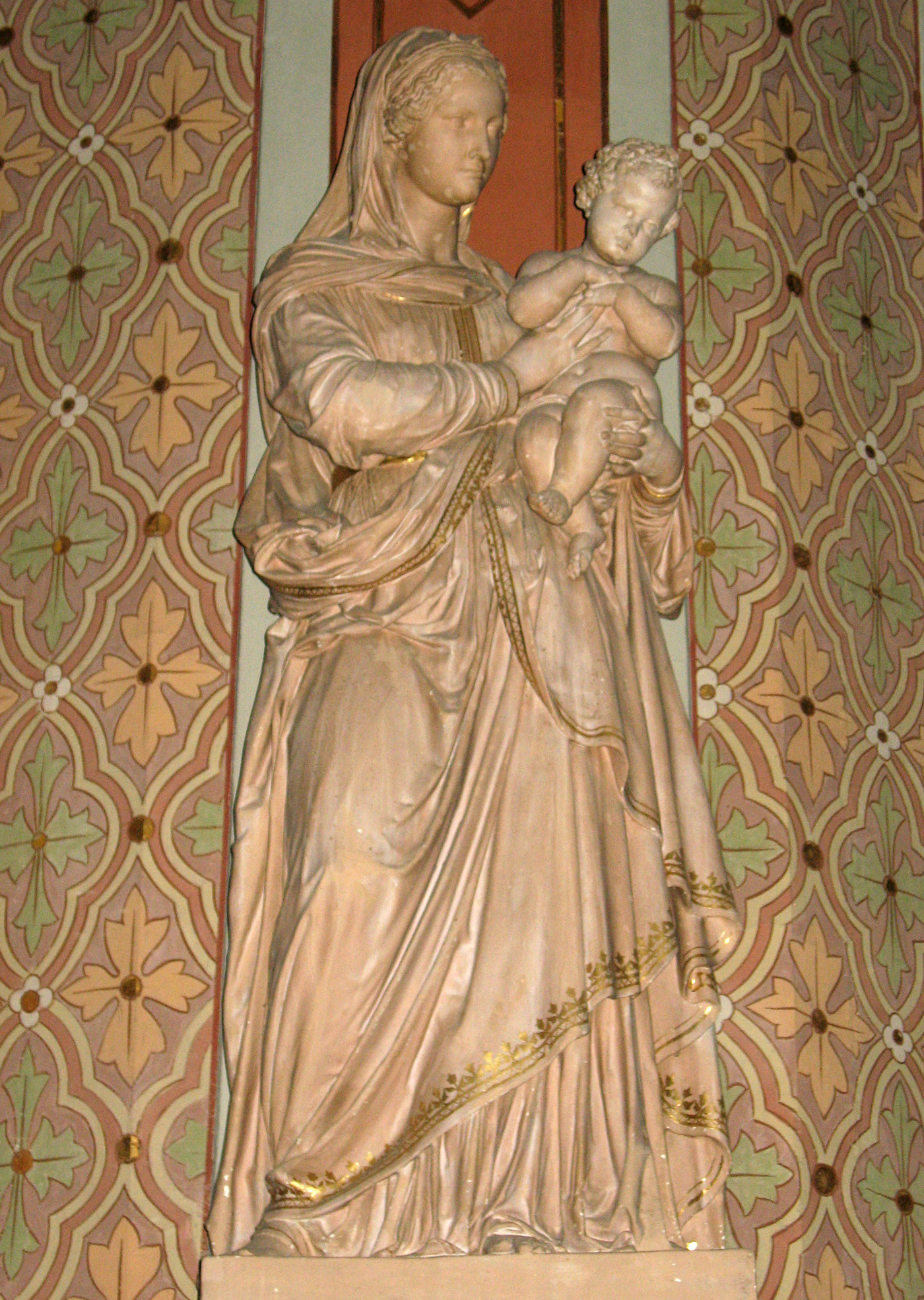 Madonna des Johann Dominik Mahlknecht in der Pfarrkirche von St. Ulrich in Gröden (Südtirol)